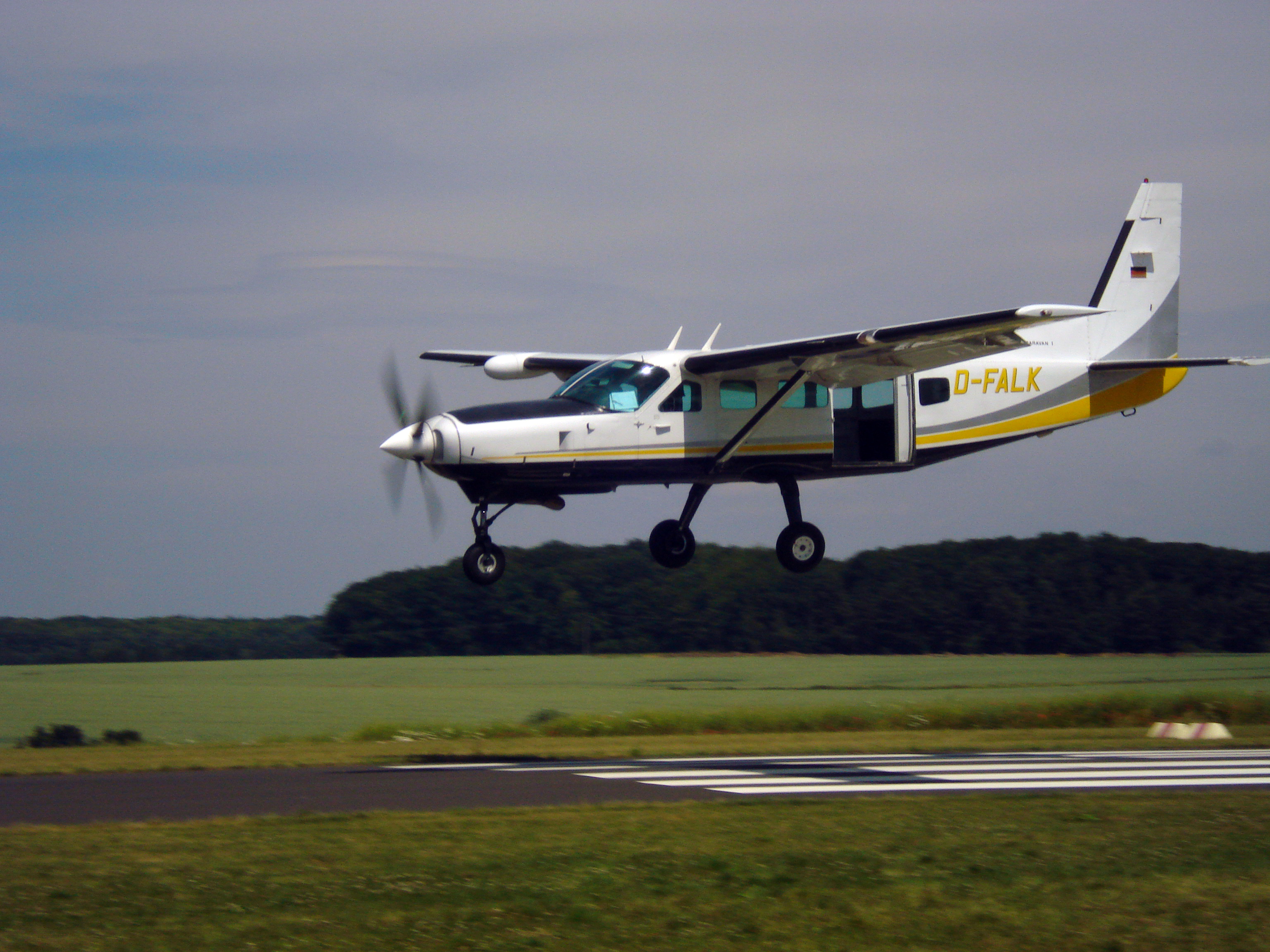 Cessna Caravan kurz vor Touch Down auf dem Flugplatz Günterode/Heiligenstadt